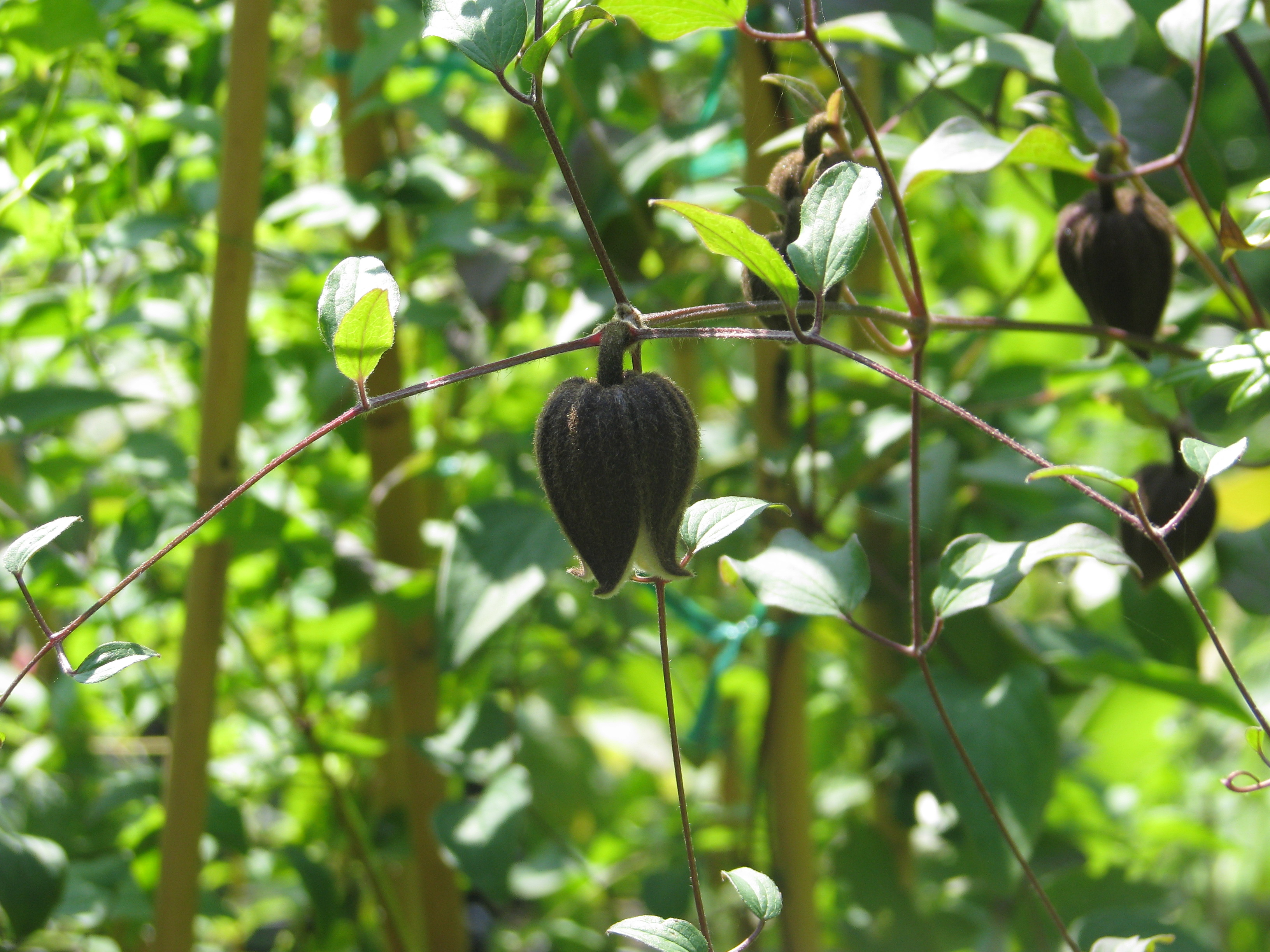 Clematis fusca